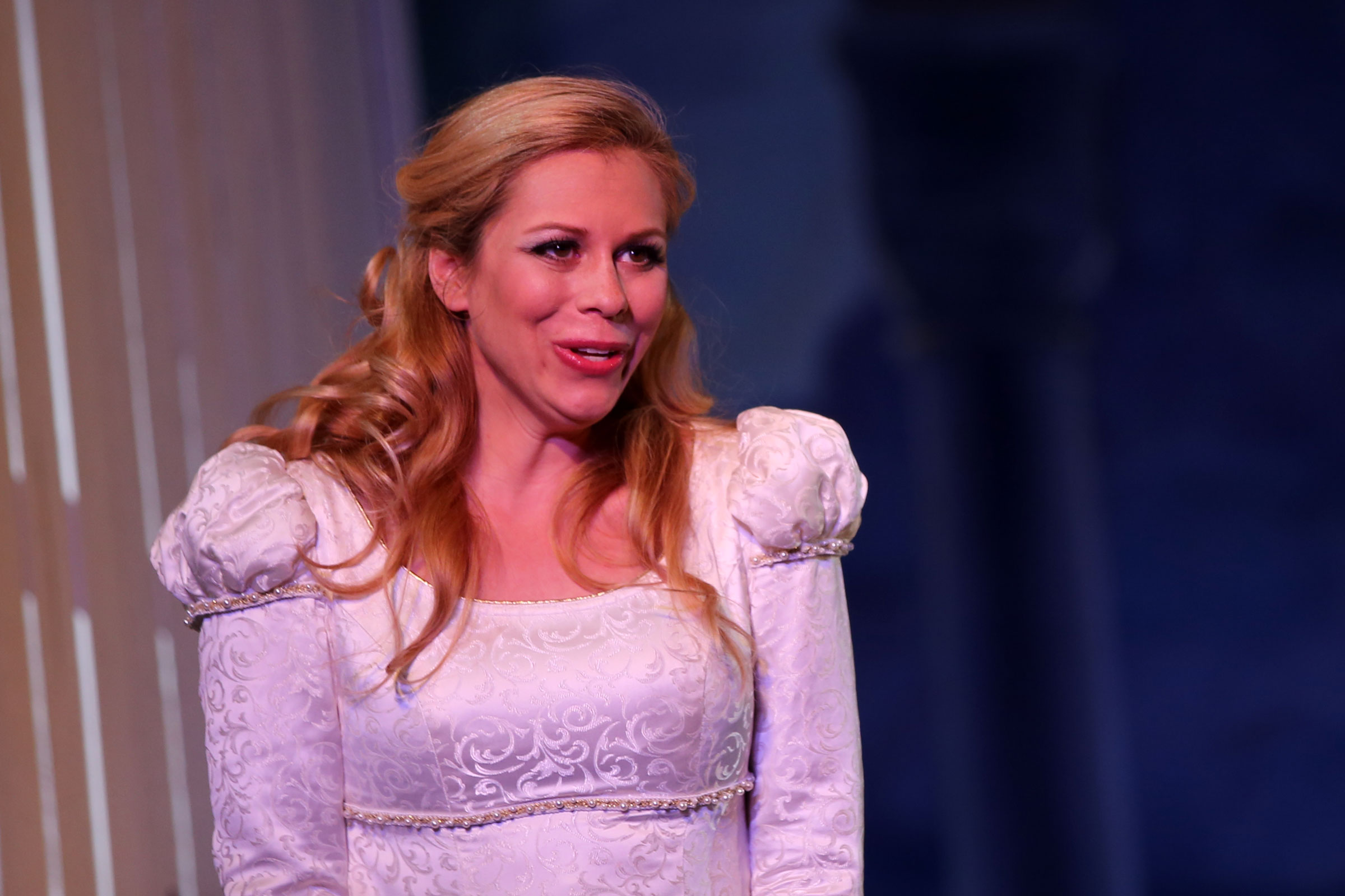 Fally_Daniela-Gilda-7739